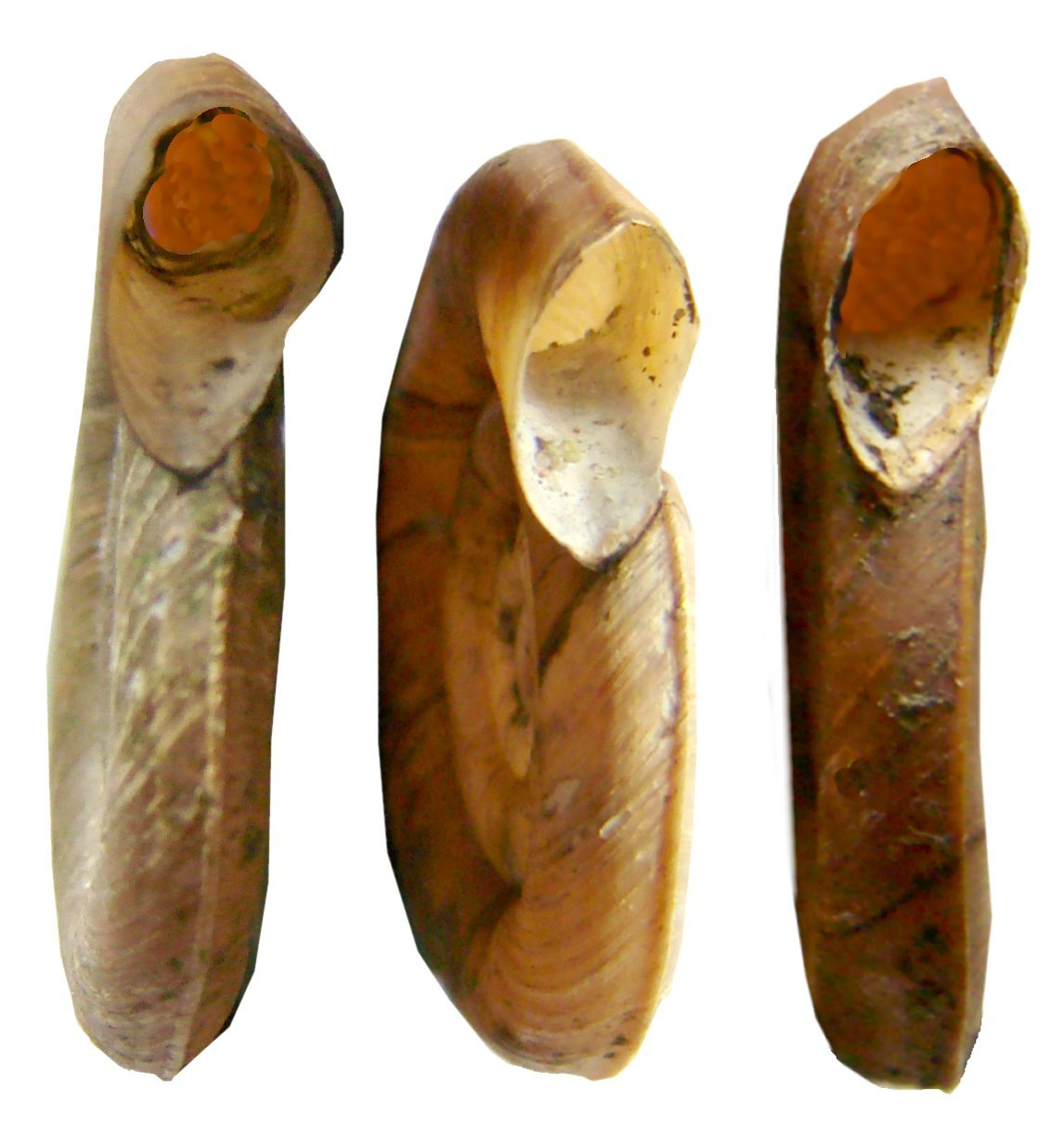 Anisus spirobis